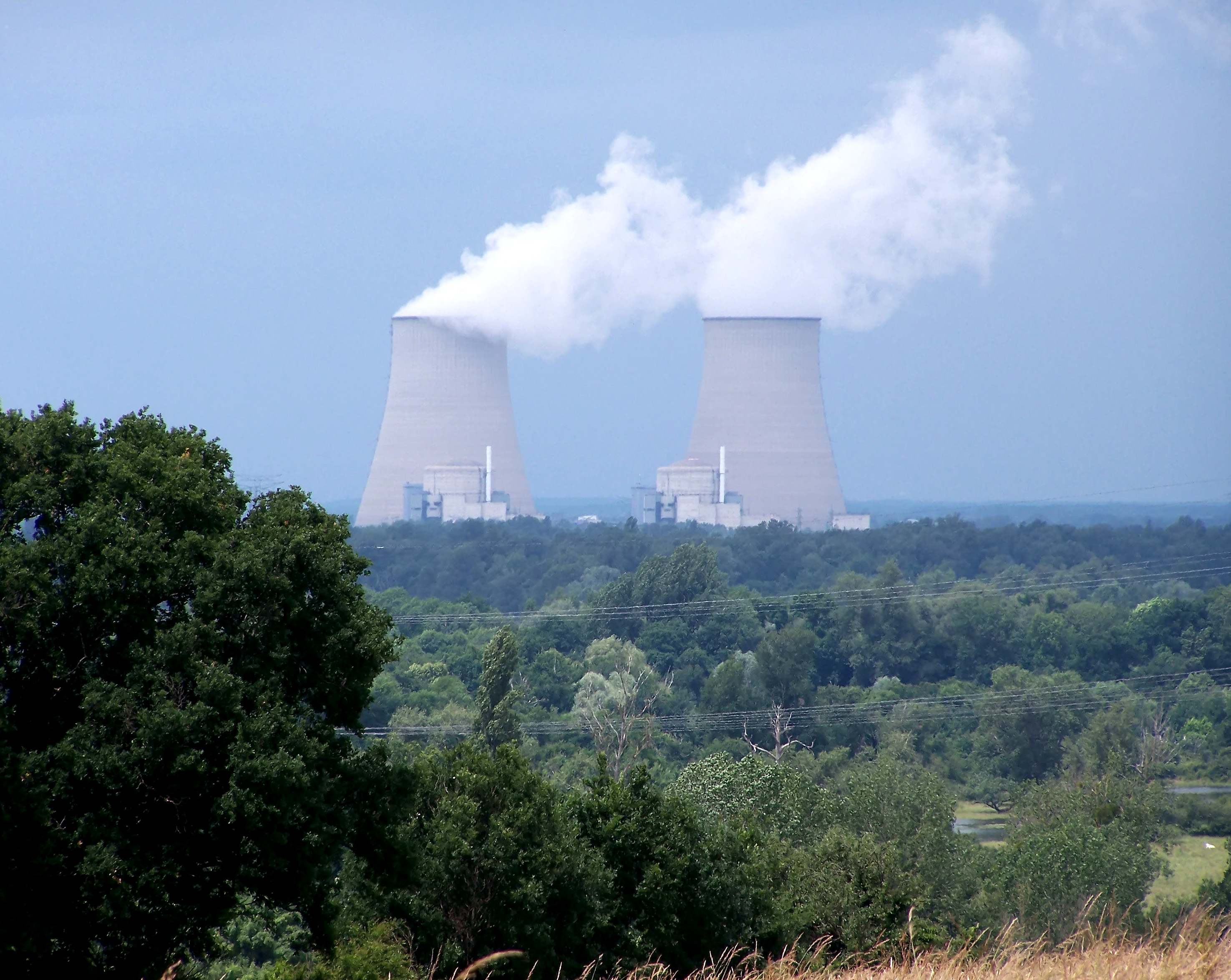 Vue sur la centrale nuclaire de Belleville-sur-Loire (18), depuis Myennes (58)